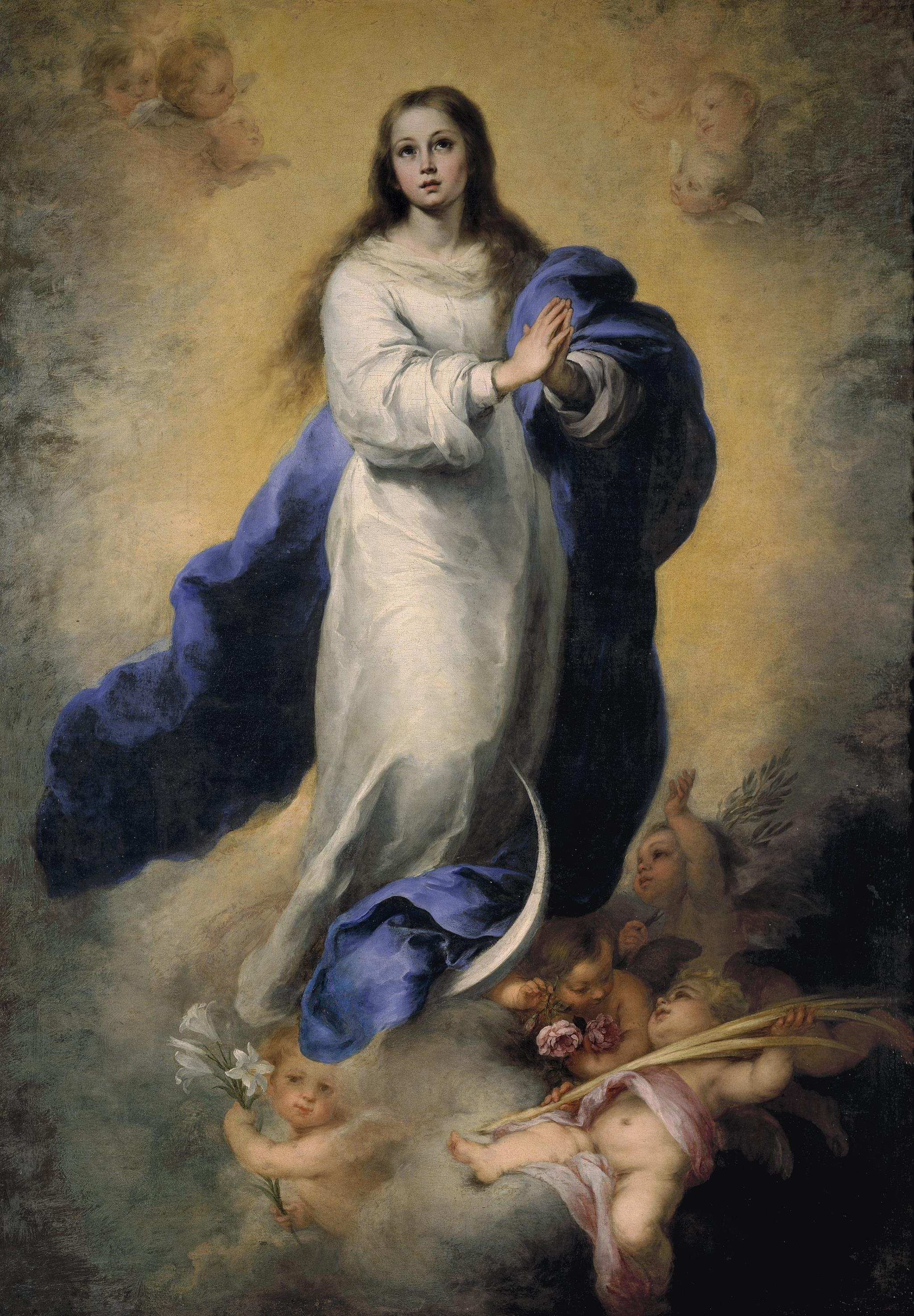 Esta obra es una de las Inmaculadas de Bartolomé Esteban Murillo con aspecto más juvenil, lo que la vincula con la tradición sevillana del también pintor sevillano Francisco de Zurbarán, y con las recomendaciones sobre la representación de este tema manifestadas por Francisco Pacheco en su Arte de la pintura, que escribió en 1649. Además, hay varios dibujos preparatorios para esta obra ejecutados por Murillo, lo que demuestra que el pintor sevillano se preparó concienzudamente para ejecutarla, y es conocida como Inmaculada del Escorial porque aparece citada por primera vez en las colecciones reales del monasterio de El Escorial en 1788, durante el reinado de Carlos IV de España.